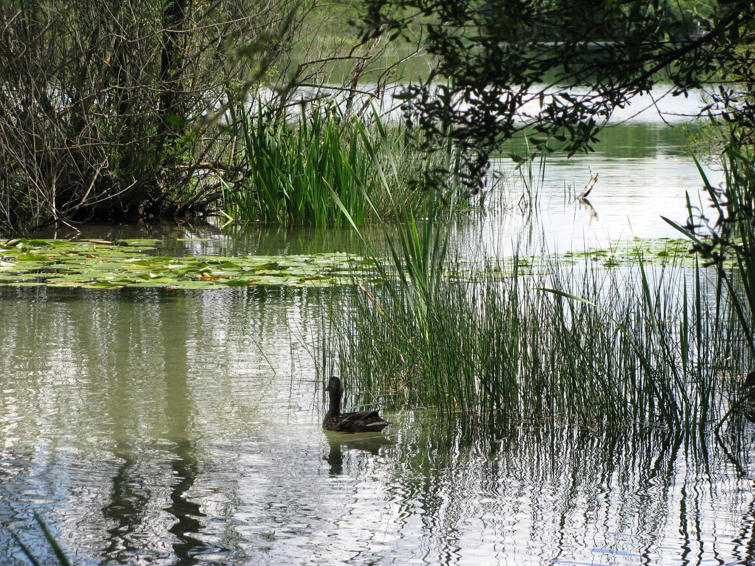 See in der Allacher Lohe, Bereich auf der Westseite